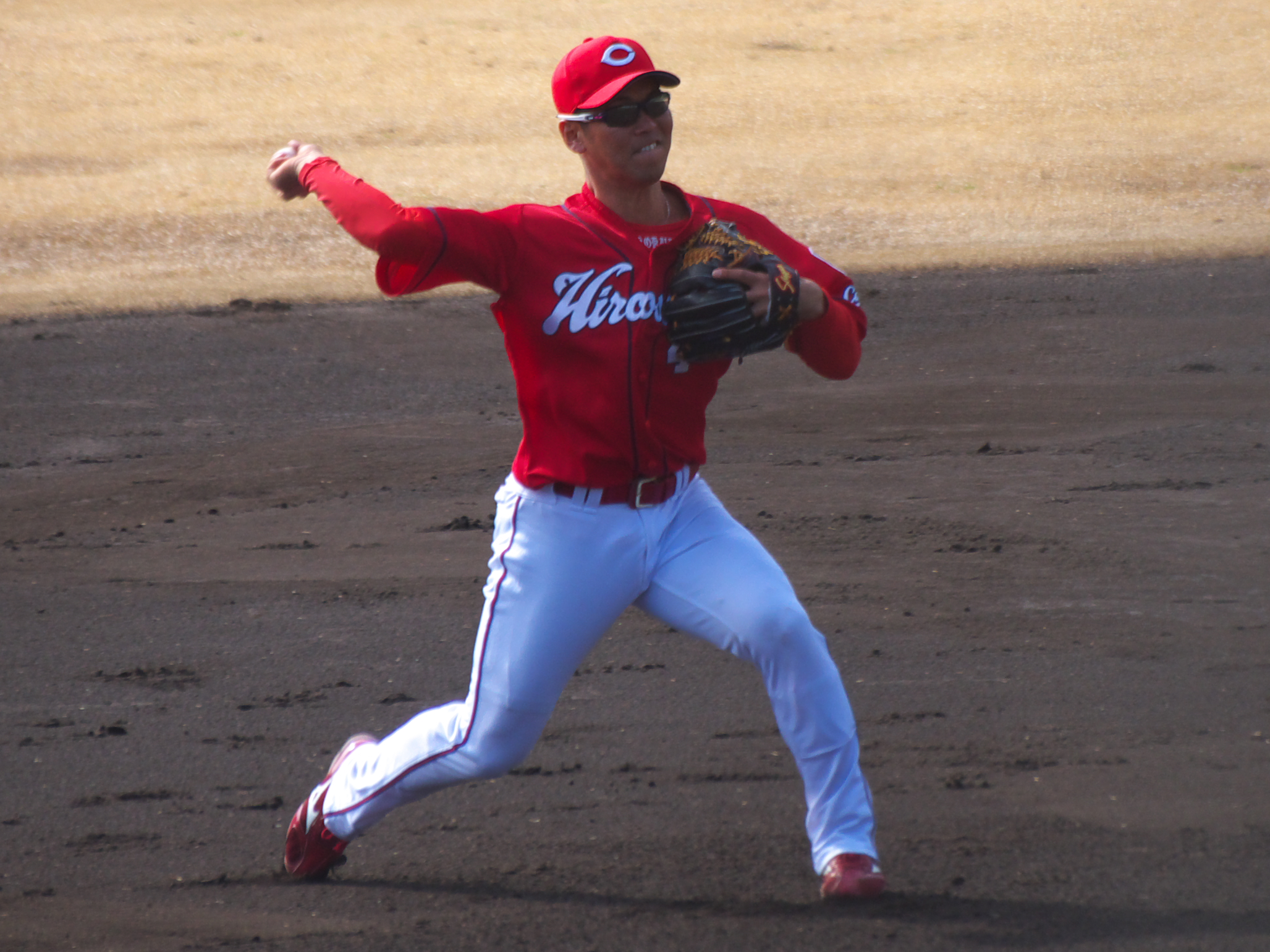 2018年2月18日 広島東洋カープ小窪哲也 日南市天福球場 投稿者による撮影